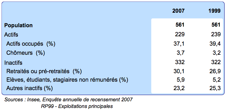 Situation de la population de Ferrières-sur-Sichon.